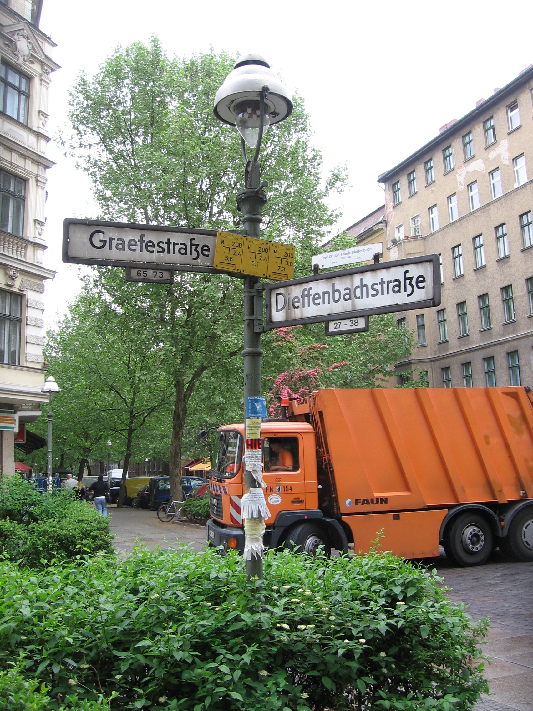 Dieffenbach- Ecke Graefestraße in Berlin-Kreuzberg